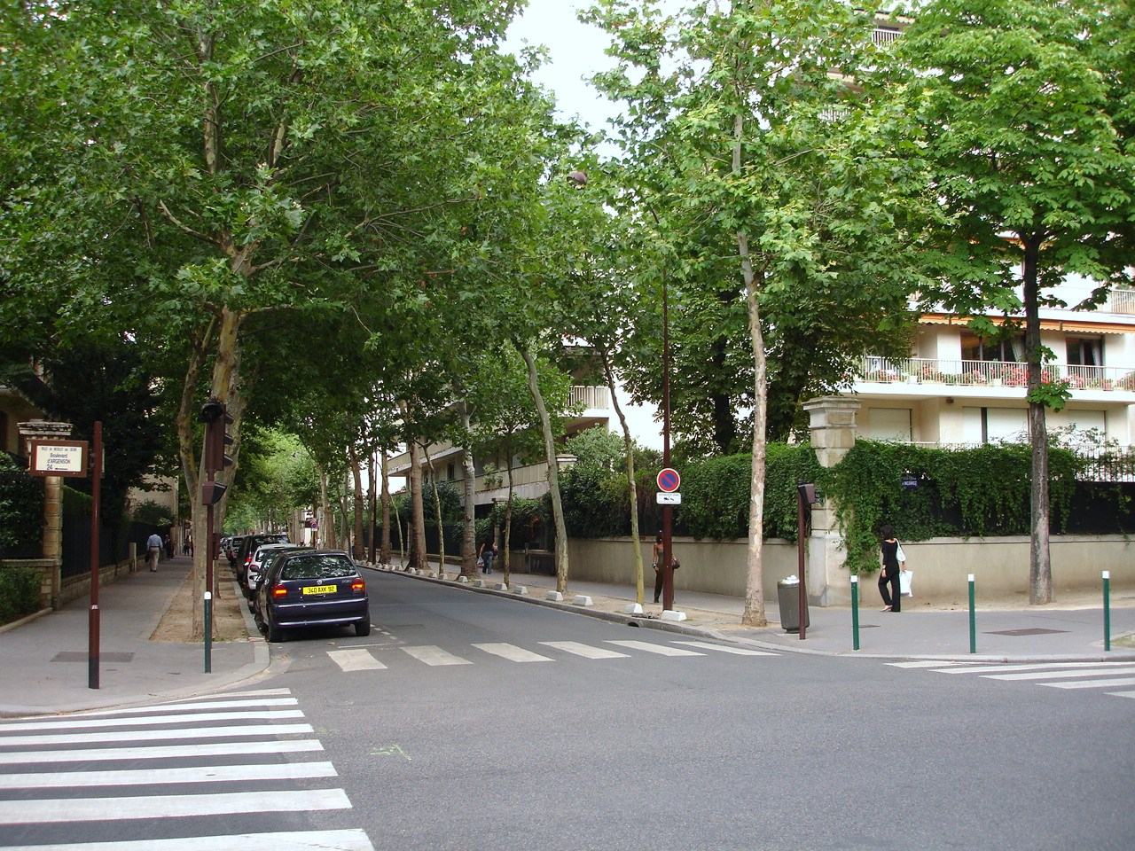 Rue de Chézy.